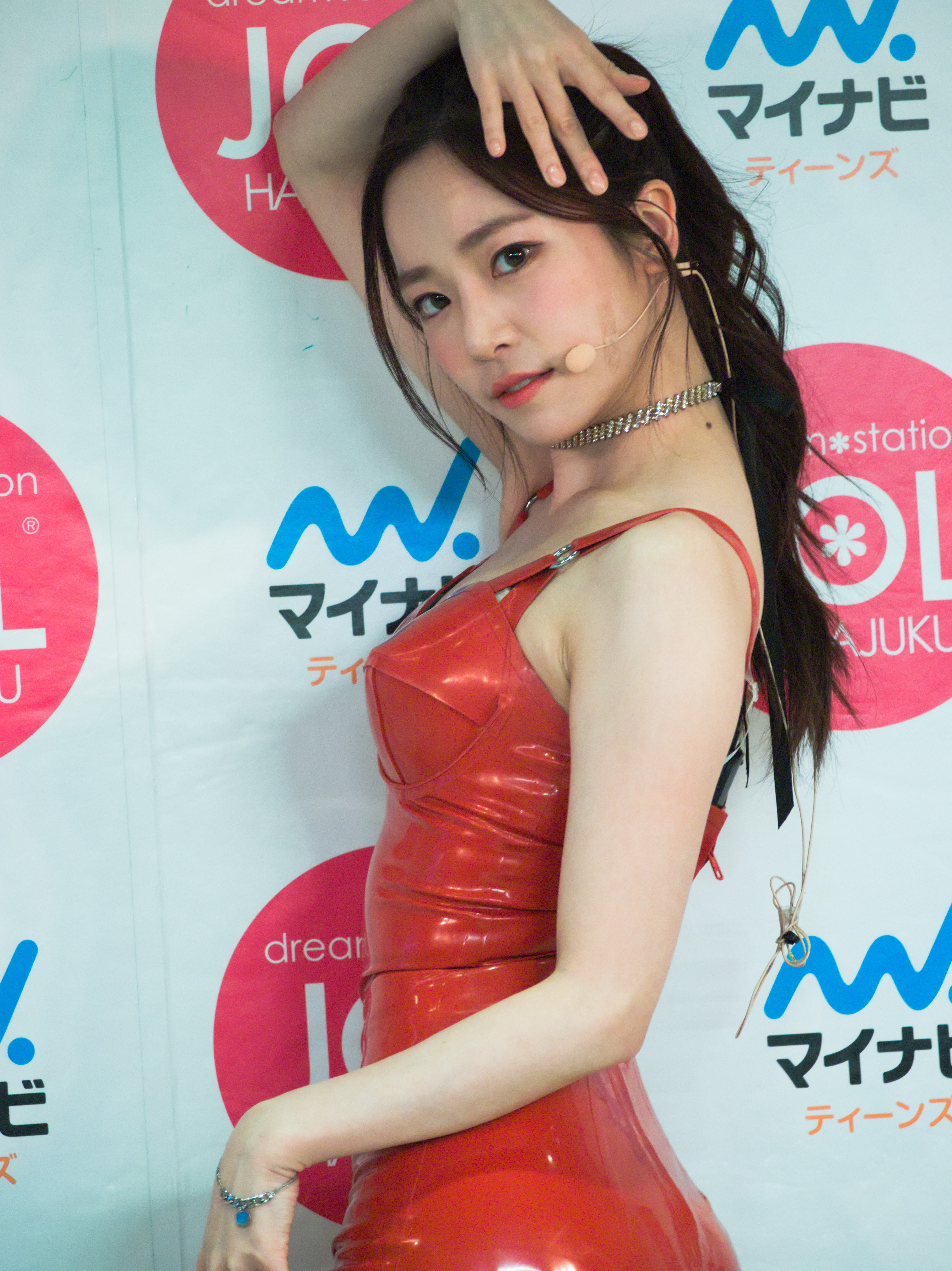 SoRi Touch Japanese ver. リリースイベント Stage.3 JOL原宿